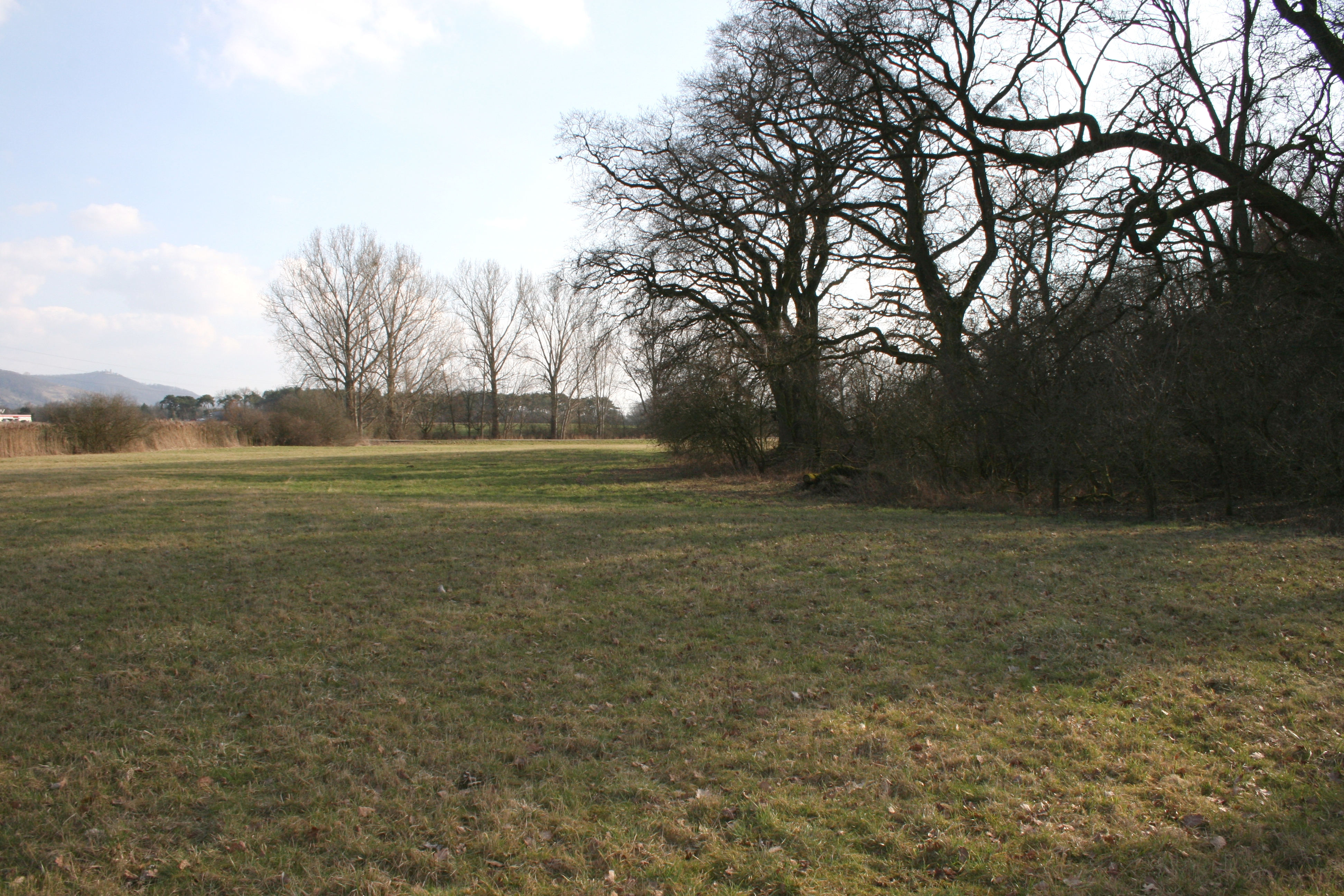 Weilerhügel bei Alsbach-Hähnlein. Ansicht des inneren Grabens östlich der Burg (Blick nach Süden).